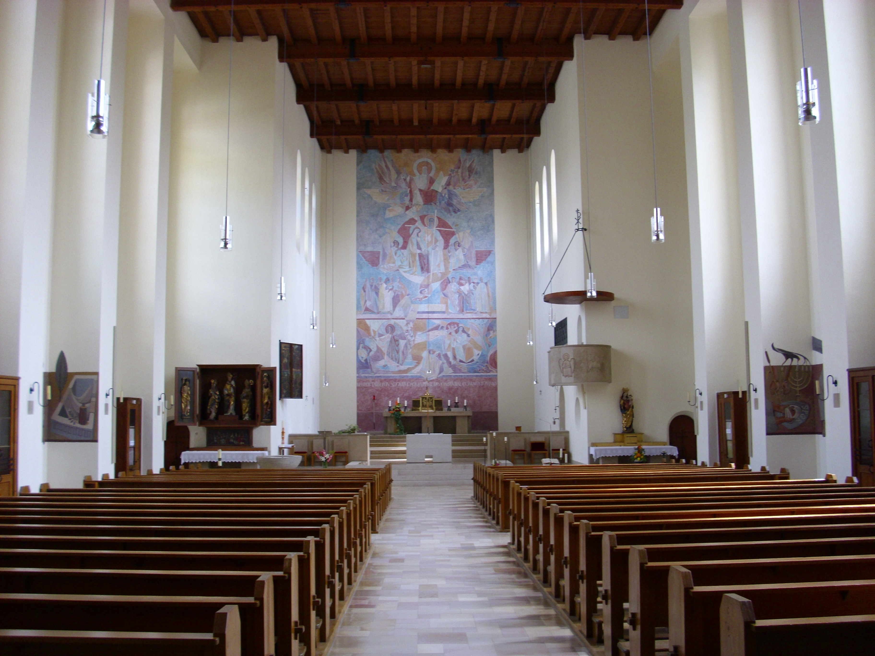 Innenansicht der Marienkirche in Treuchtlingen